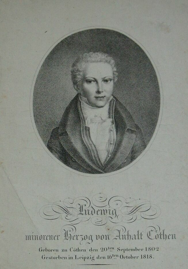 Ludwig Herzog von Anhalt-Köthen 20.9.1802 - 16.12.1818